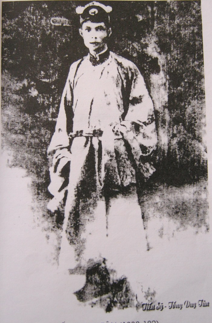 Tống Duy Tân (1837-1892) trong phẩm phục tiến sĩ tân khoa năm 1875 (ảnh thờ). Chụp lại từ sách Tống Duy Tân của Hoàng Huyên. NXB Văn hóa Thông tin, 2007, tr. 7.